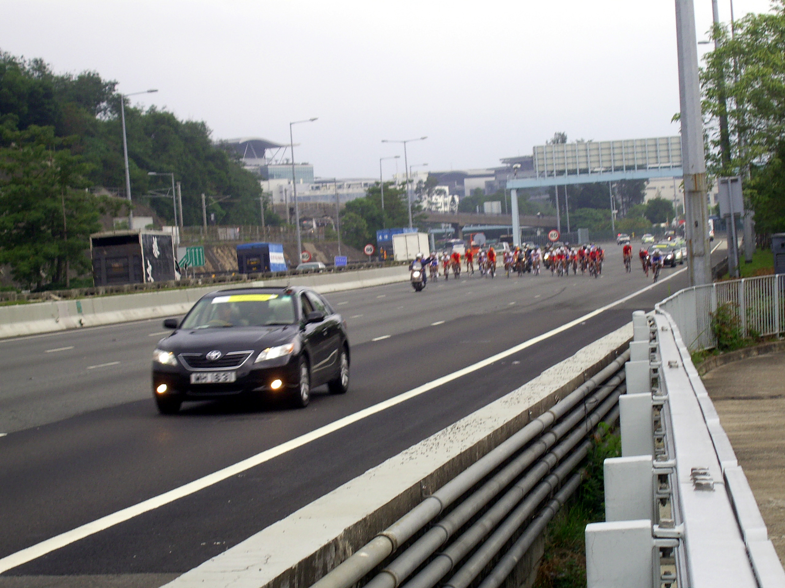 中文（香港）: 2009年東亞運動會男子單車個人公路賽吐露港公路賽段